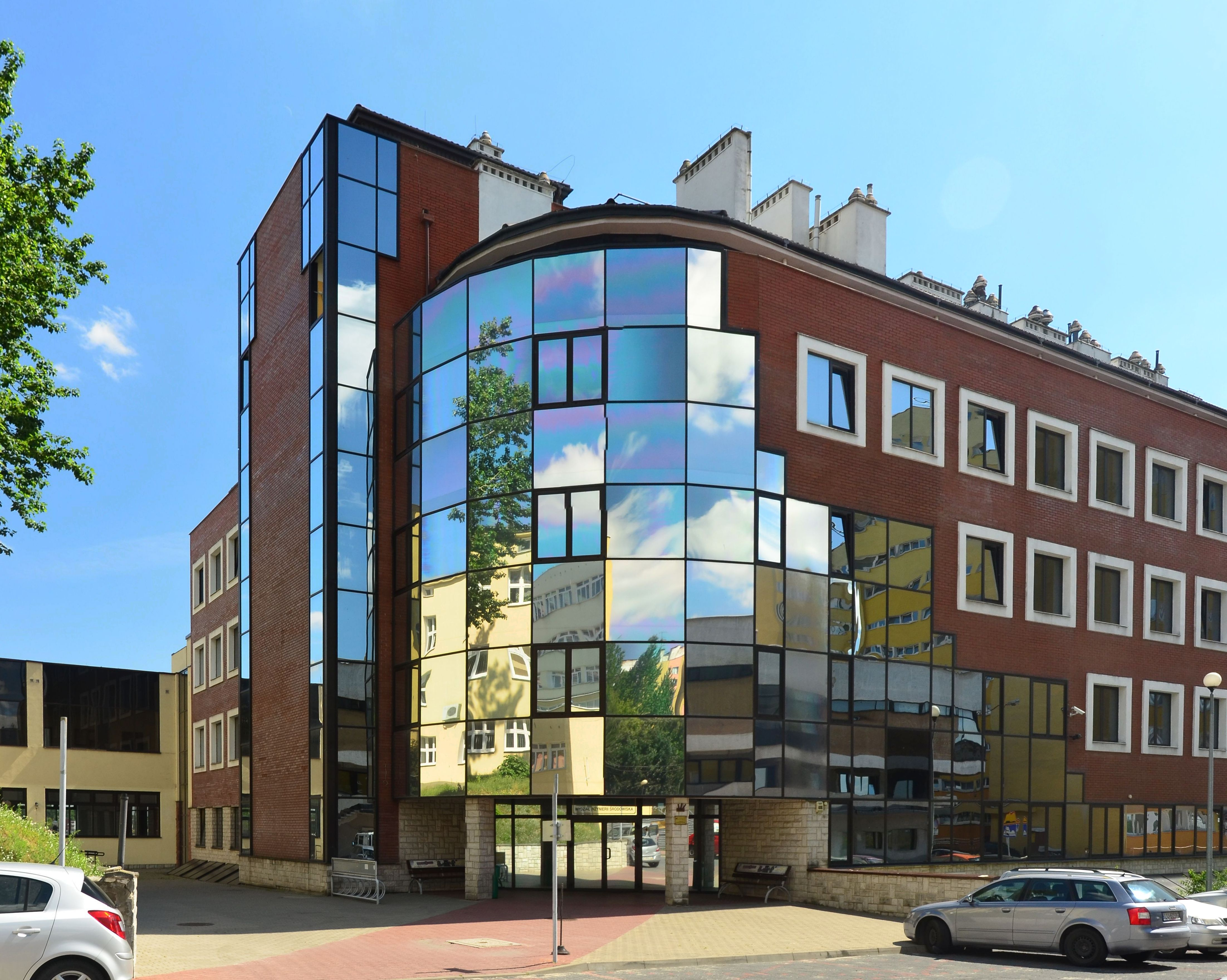 Budynek dydaktyczny na terenie Politechniki Lubelskiej w Lublinie, przy ul. Nadbystrzyckiej. Wydział Inżynierii Środowiska